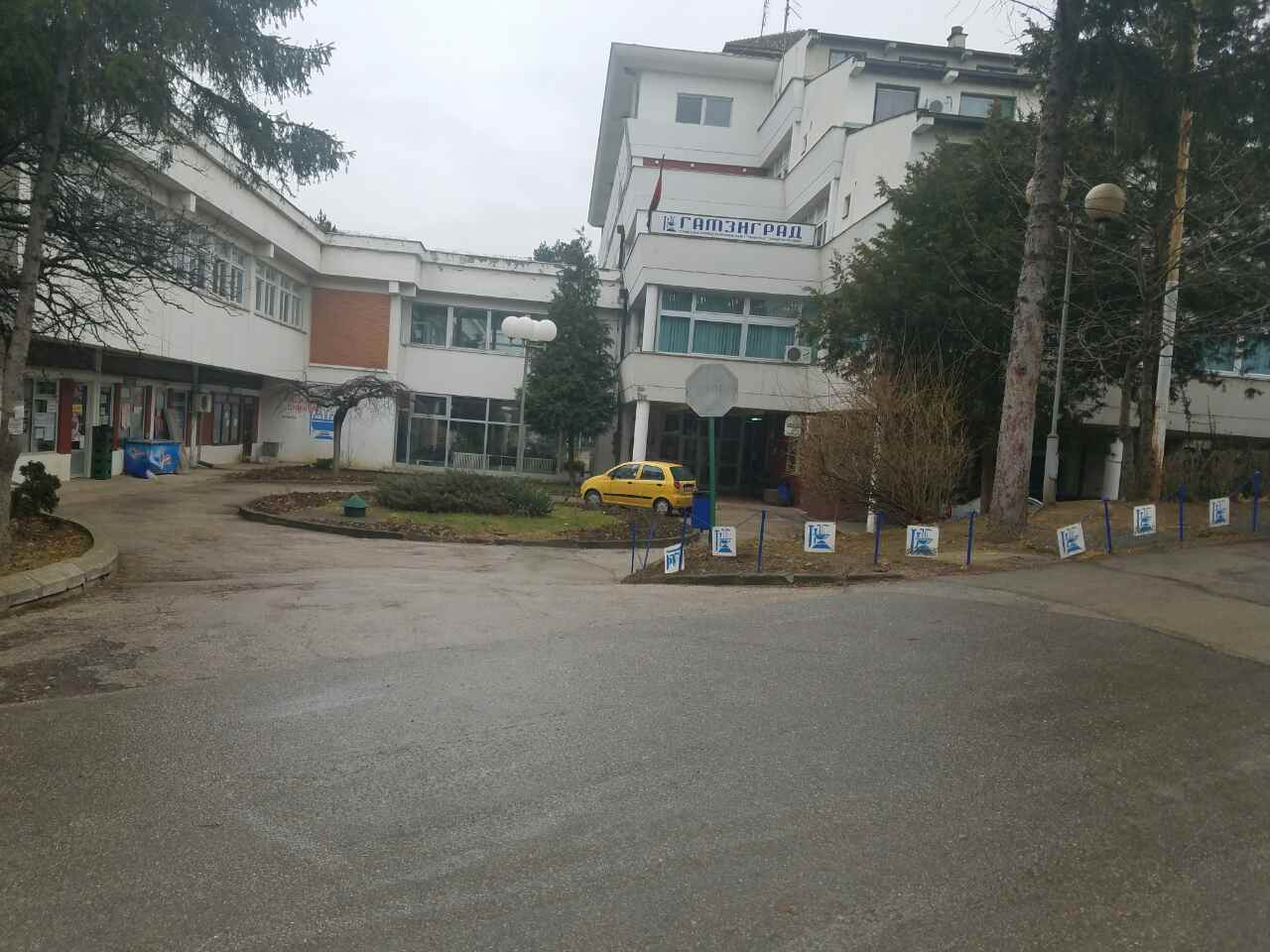 Гамзиградска Бања